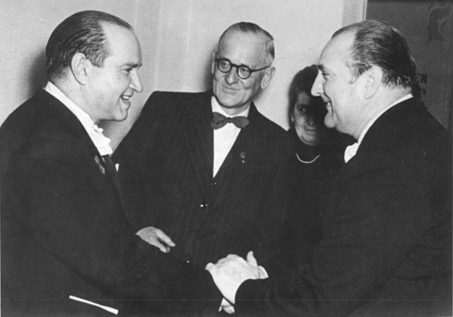 Zentralbild-Braun Str-Sta. 15.2.1954 David Oistrach spielt in Dresden Der berühmte sowjetische Geigenvirtuose, Stalinpreisträger und Verdienter Künstler David Oistrach gab am 12.2.1954 im Hygiene-Museum in Dresden ein Konzert mit der Staatskapelle Dresden unter Leitung von Nationalpreisträger Franz Konwitschny. UBz: David Oistrach (links) nach dem Konzert im Gespräch mit Professor Karl Laux, Leiter der Musikhochschule Dresden (Mitte) und Generalmusikdirektor Franz Konwitschny.